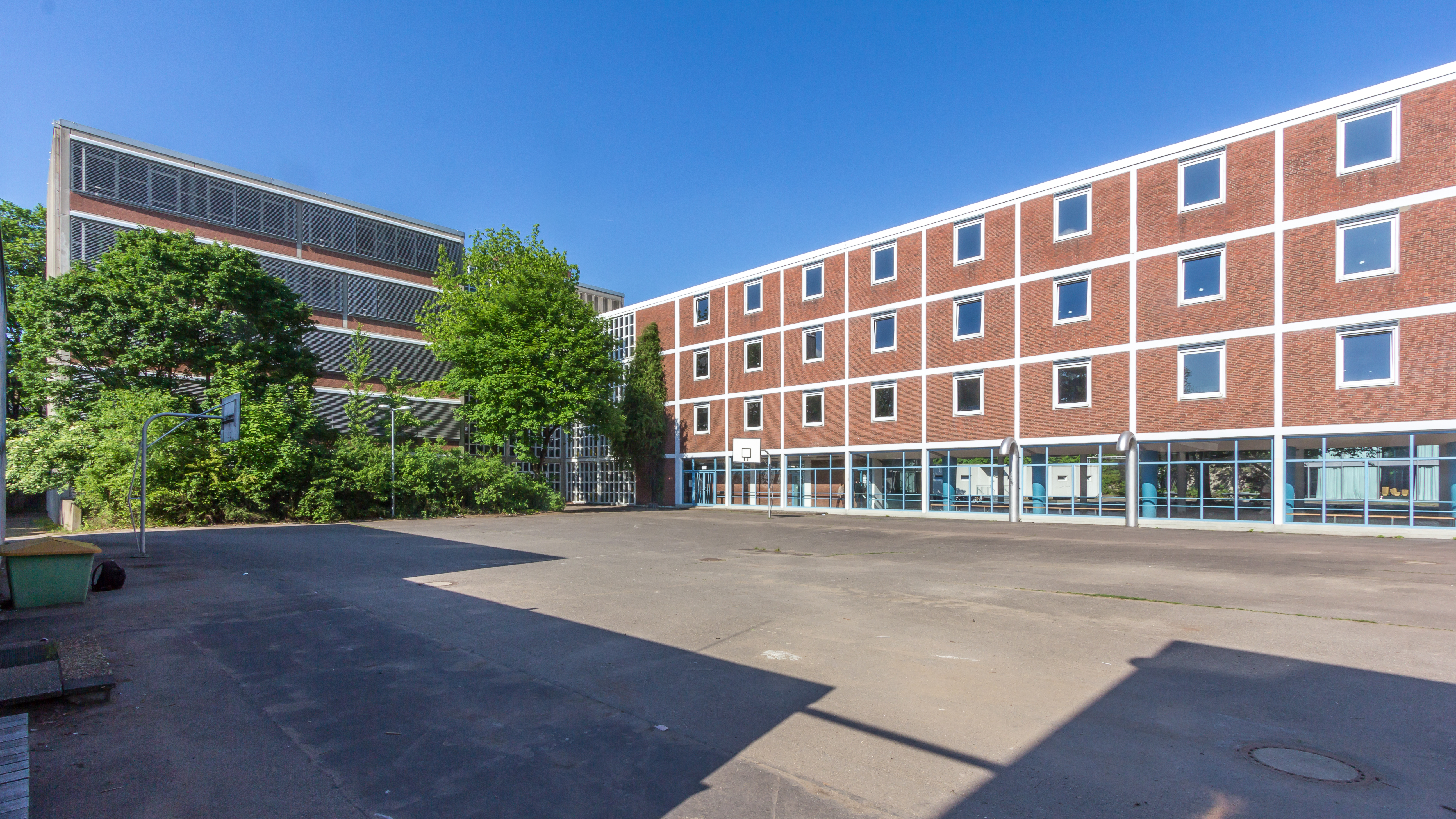 Albertus-Magnus-Gymnasium, Köln. Foto: Zentraler Gebäuderiegel, Blickrichtung Nordwest